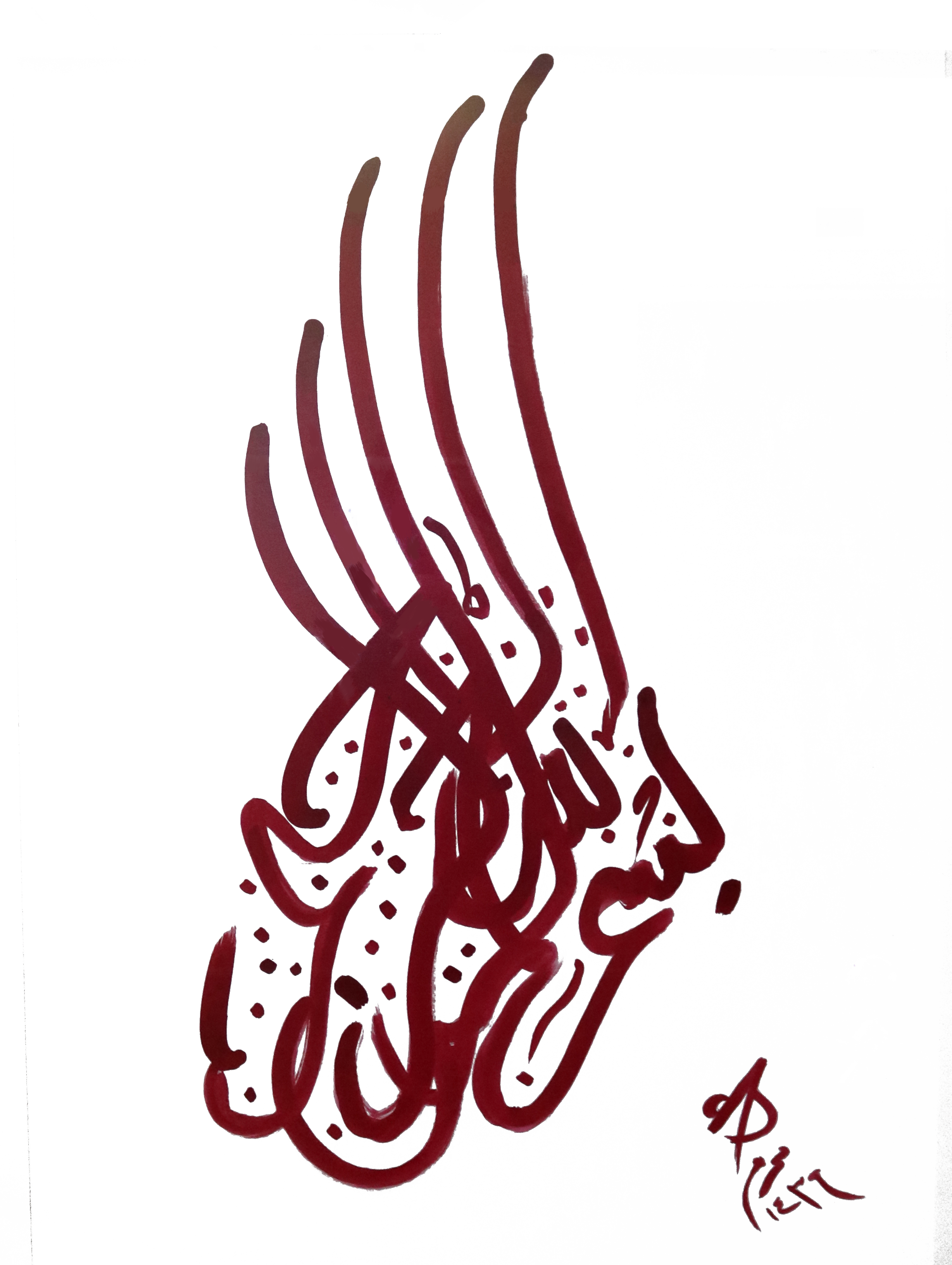 الخط العربي - الشيخ محمد بن فيصل القاسمي